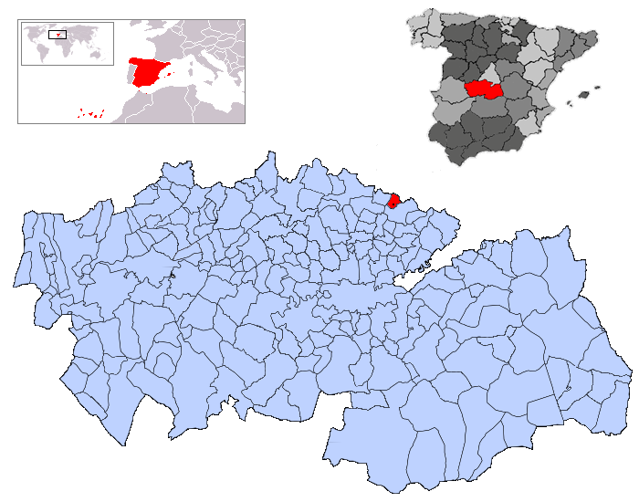 Ugena en la provincia de Toledo